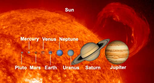 Planéiten no hierer Gréisst.